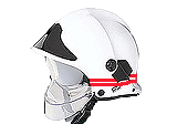 Kapitein